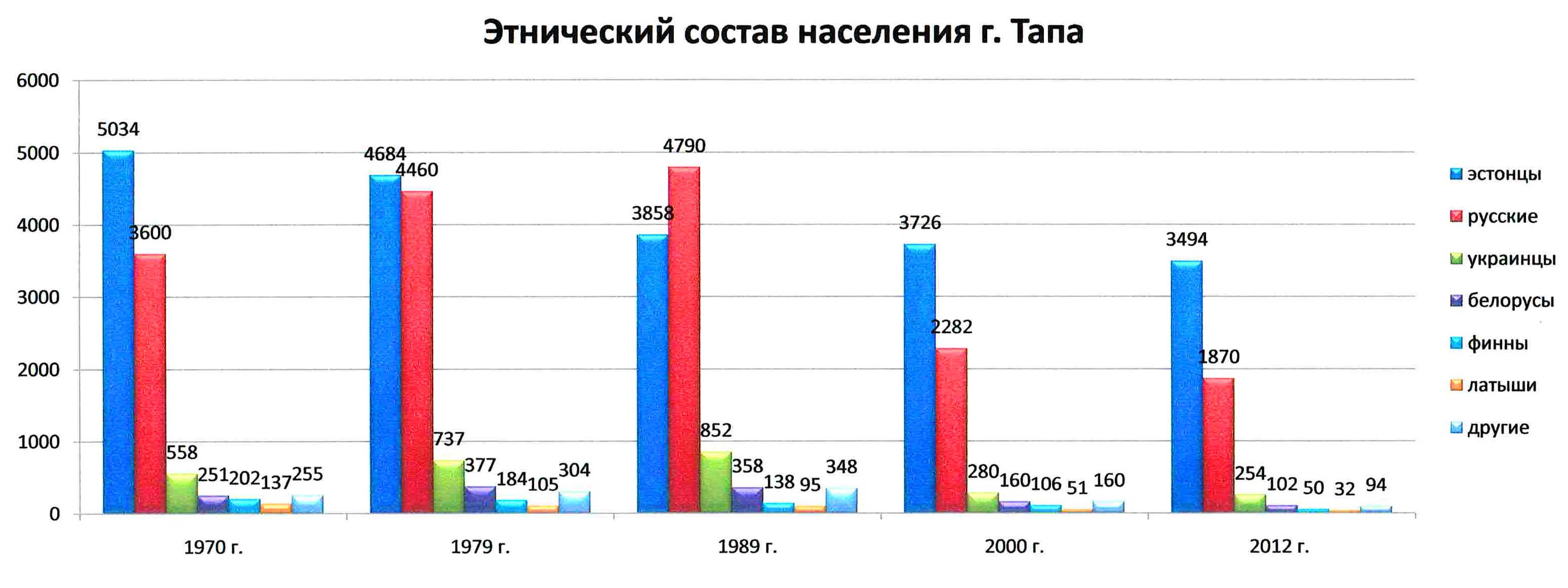 На данной диаграмме - этнический состав города Тапа в ХХ веке